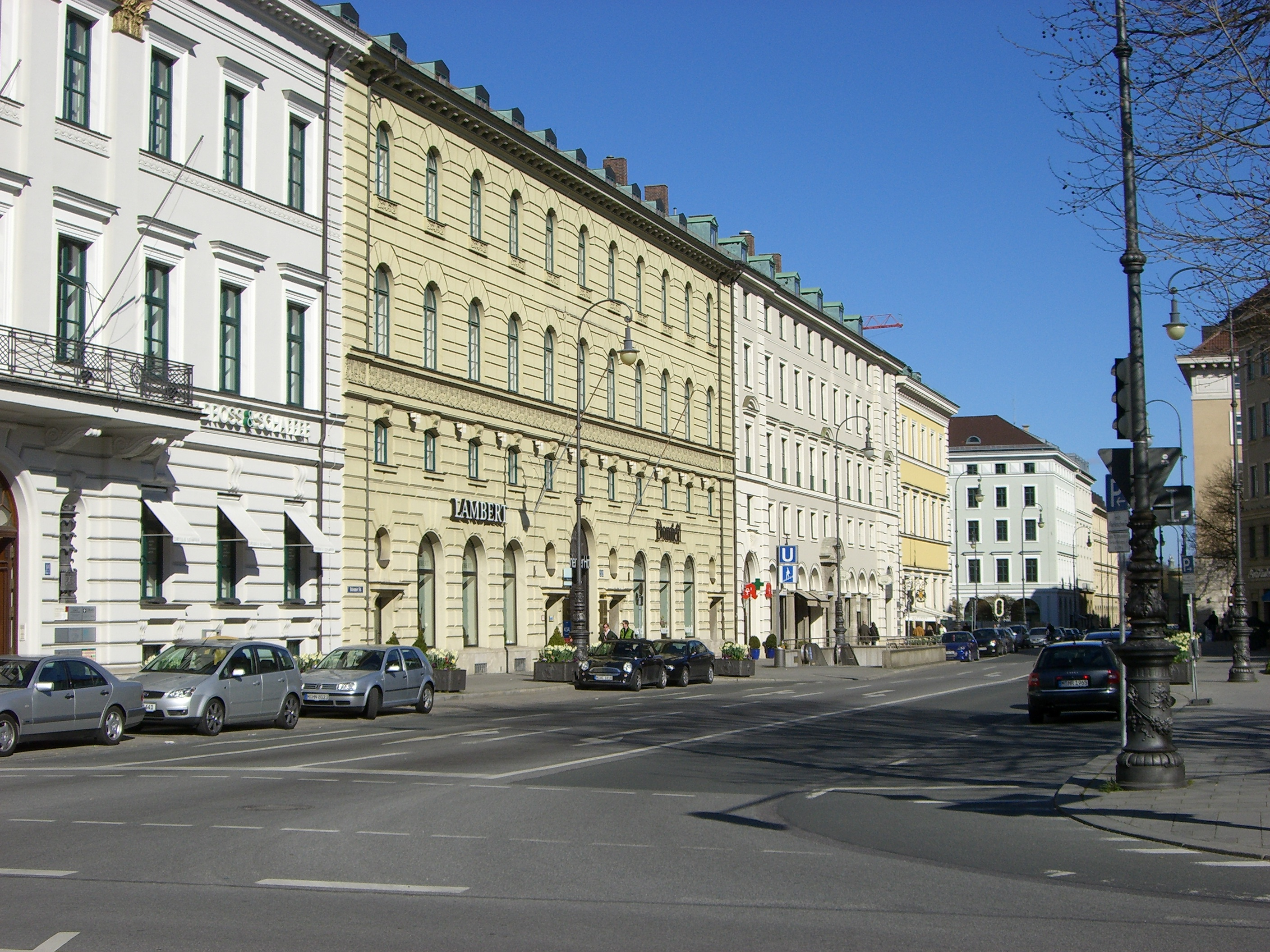 München: Brienner Straße (Ostteil innerhalb des Altstadtrings)